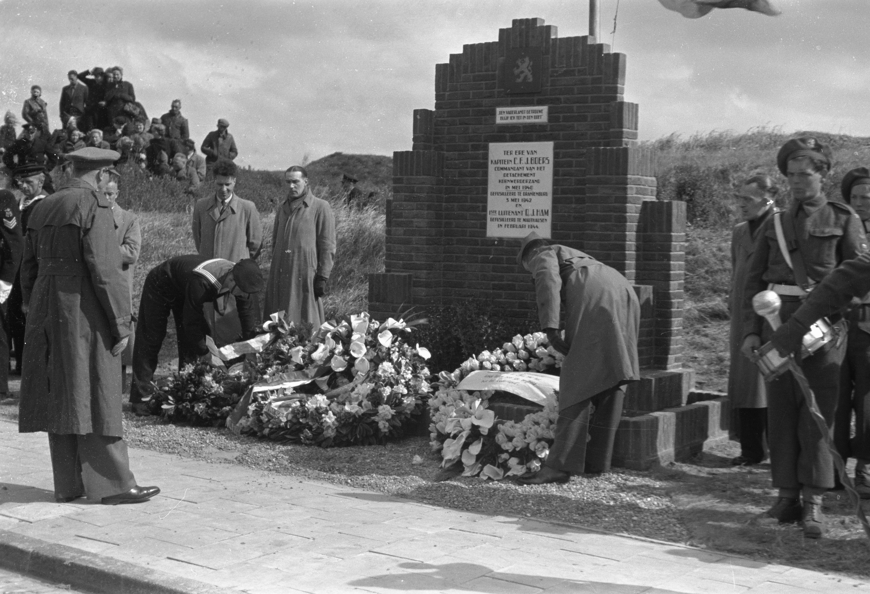 Collectie / Archief : Fotocollectie Anefo Reportage / Serie : [ onbekend ] Beschrijving : Onthulling monument Kornwerderzand Datum : 17 mei 1946 Locatie : Kornwerderzand Trefwoorden : MONUMENT, Onthulling Fotograaf : Breijer, Charles / Anefo Auteursrechthebbende : Nationaal Archief Materiaalsoort : Negatief (zwart/wit) Nummer archiefinventaris : bekijk toegang 2.24.01.05 Bestanddeelnummer : 901-7508